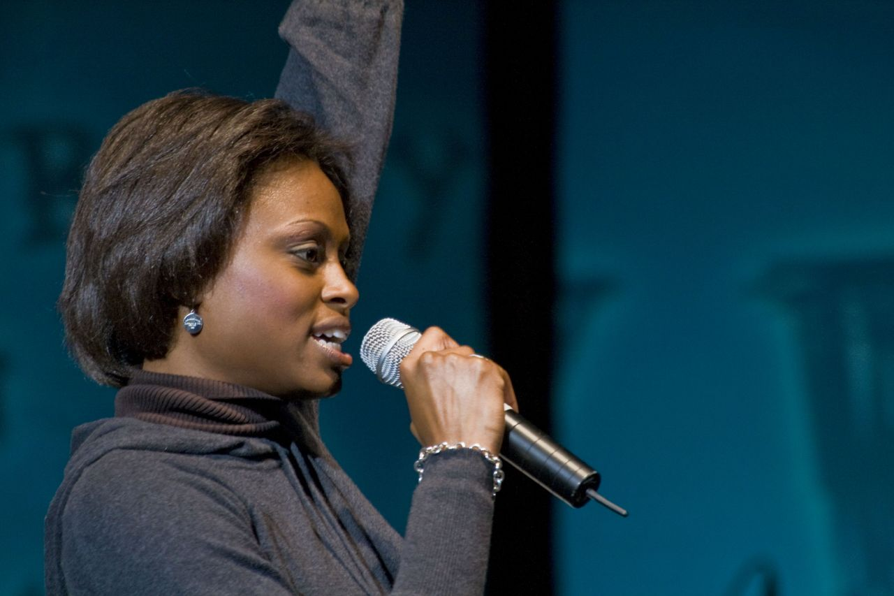 Ayiesha Woods